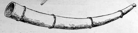 Ilustracja do Encyklopedii staropolskiej T.3 151